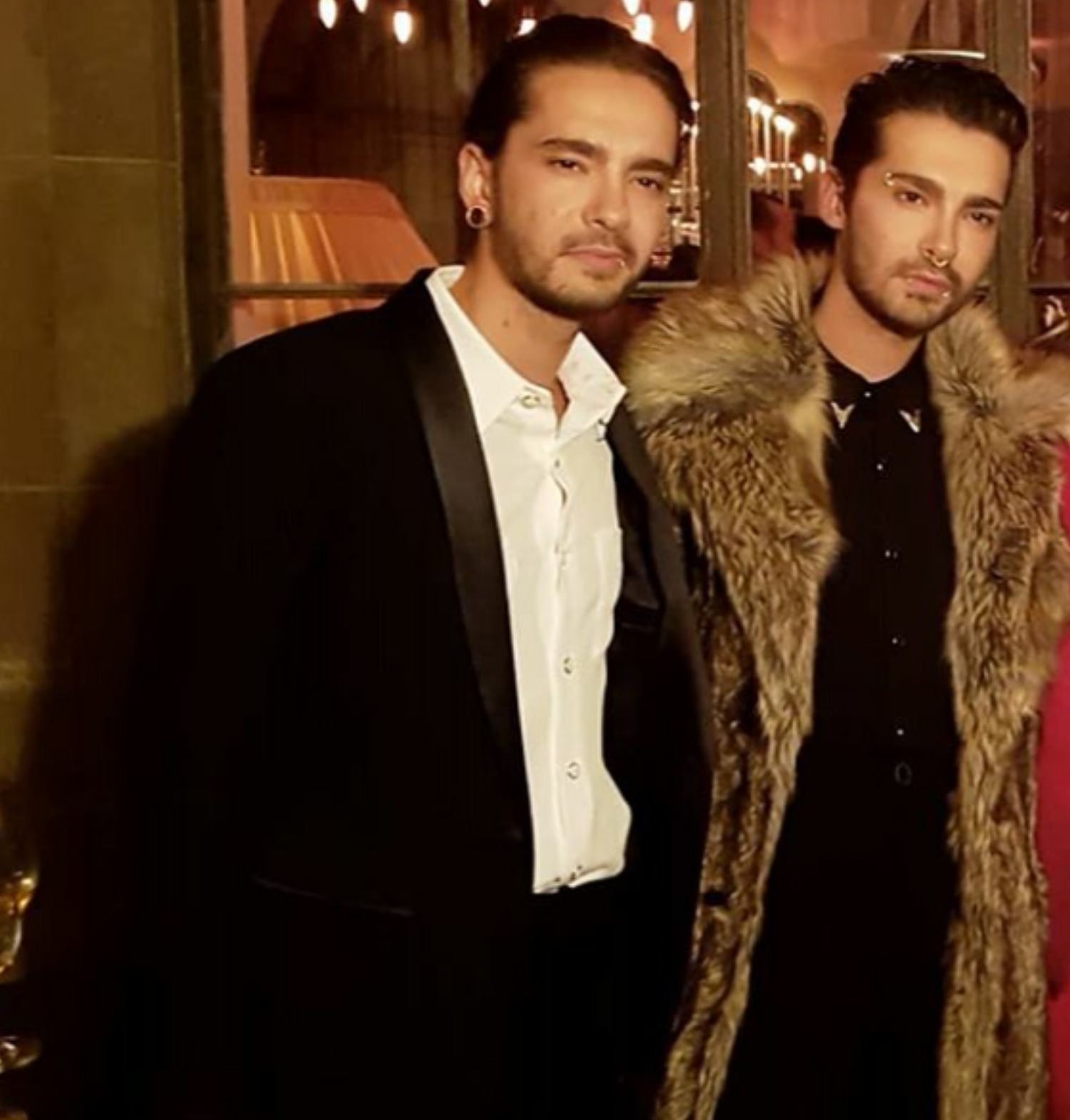 Tom y Bill Kaulitz en los Cadillac pre oscar party